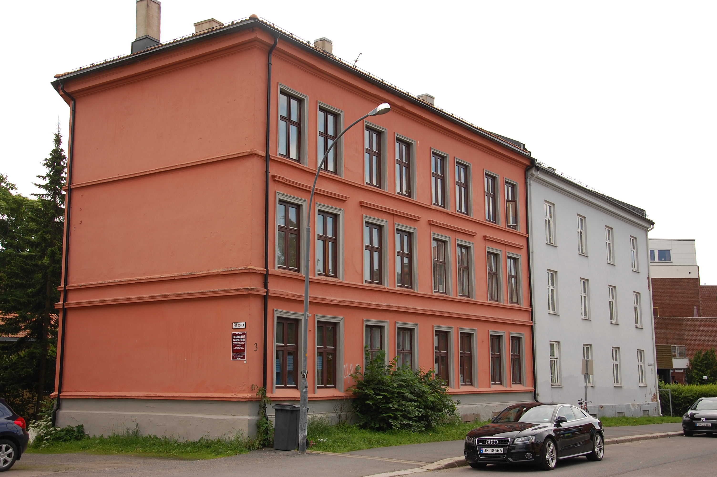 Mor Go'hjertas vei 1 og 3 på Bjølsen i Oslo. Nummer 3 nærmest kamera.